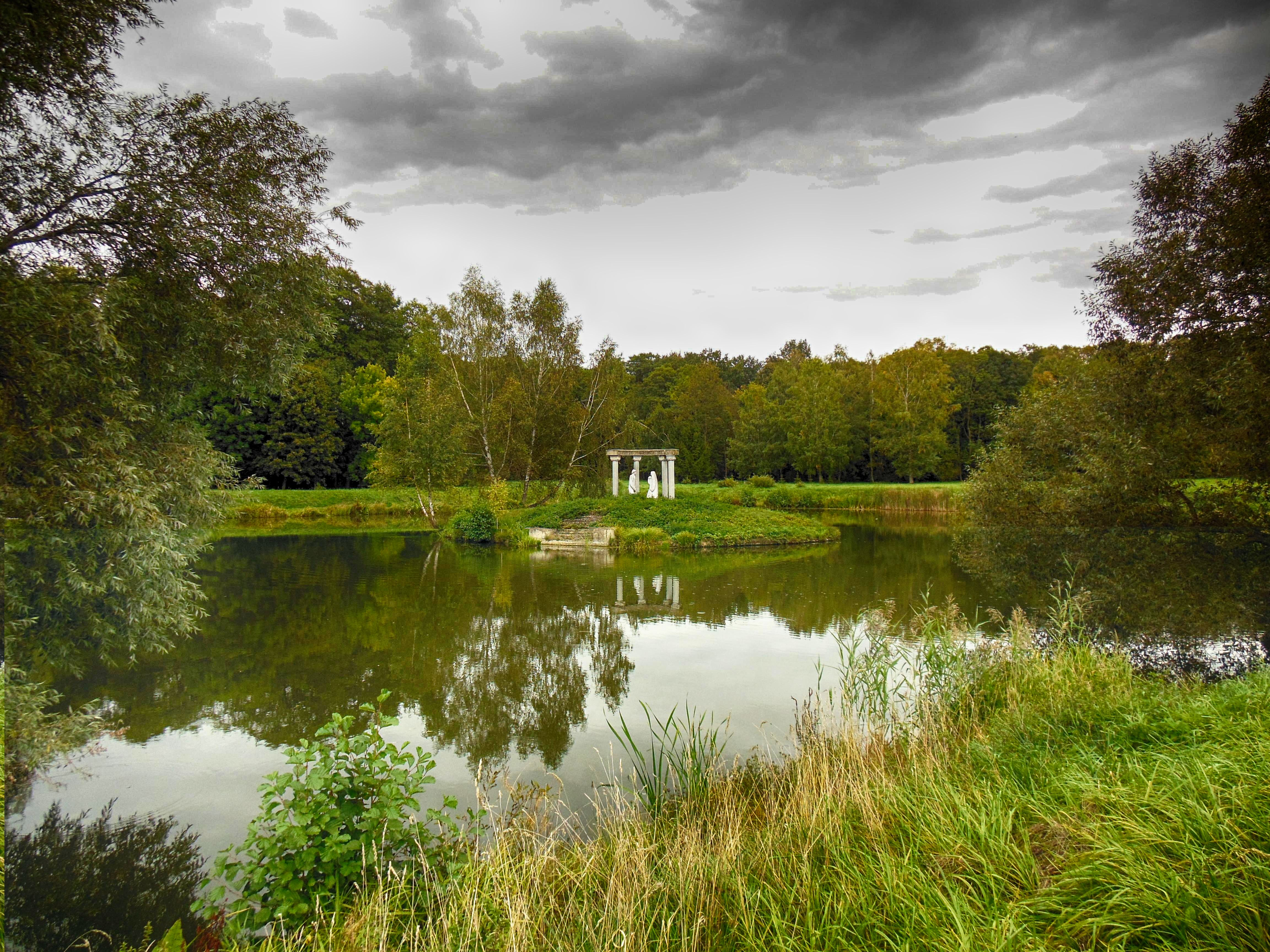 Беларуская (тарашкевіца): Палацава-паркавы ансамбль: замак-палац, паўднёвая і ўсходняя галерэі, камяніца, арсэнал з капліцай, брама, два прыбрамныя корпусы, паўночна-ўсходняя і паўднёва-заходняя галерэі, лядоўня, стайня; абарончыя збудаваньні і мост; тэрыторыя паркаў: Замкавы, Стары, Японскі, Ангельскі, Новы; водная сыстэма: Дзікі, Замкавы, Бэрнардынскі ставы. г. Нясьвіж This is a photo of Belarusian heritage monument. Reference number: 610Г000466 ( WLM)